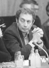 Berlin, Günter Grass, Jurek Becker, G. Baklanow, D. Granin ADN-ZB Senft 18.12.81 Berlin: An der "Berliner Begegnung zur Friedensförderung" von Schriftstellern, Künstlern und Wissenschaftlern aus europäischen Ländern vom 13. bis 14. Dezember 1982 nahmen Grigorij Baklanow . Abgebildete Personen: Baklanow, Grigorij: Schriftsteller, Sowjetunion (PND 118171674)